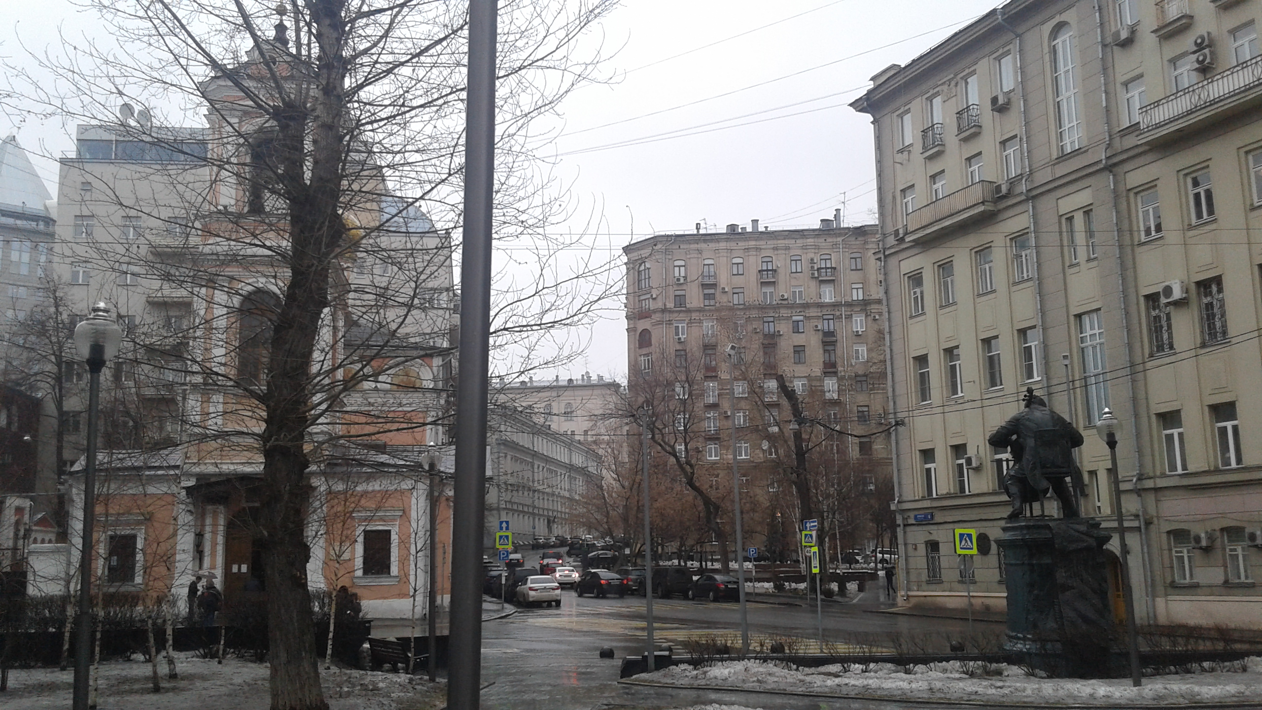 Rostropovich-Platz (Moskau)